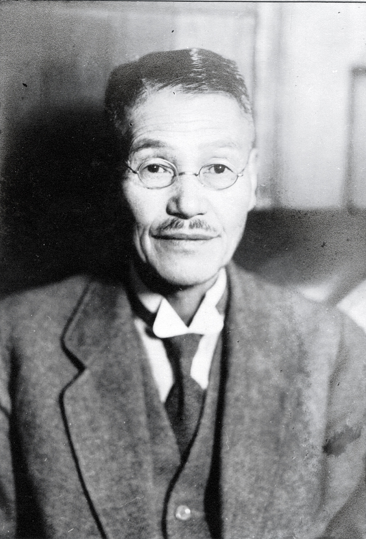 中村進午の肖像写真